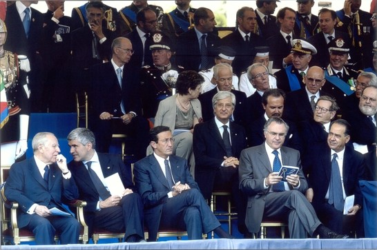 Festa della Repubblica: Rivista Militare